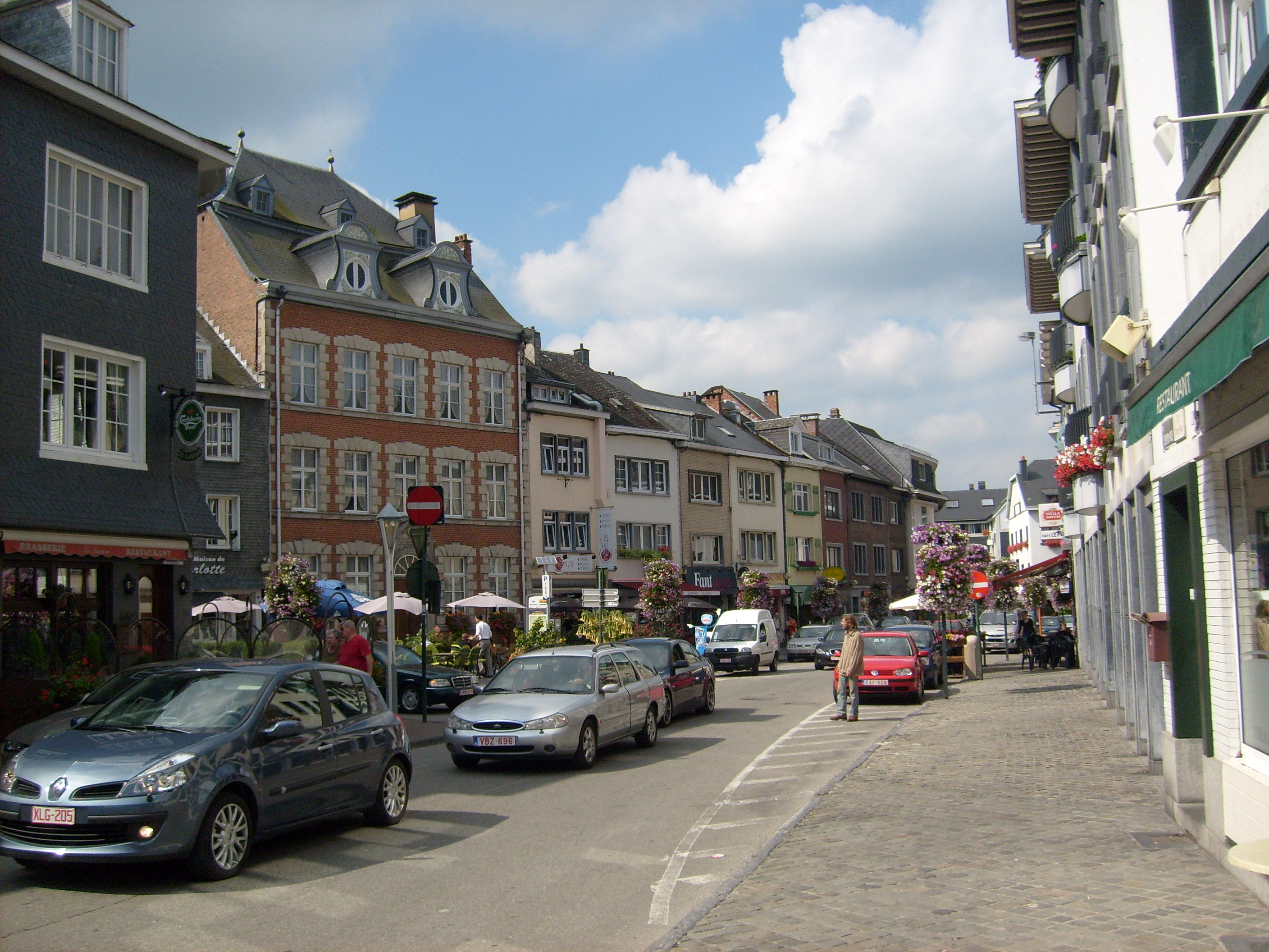 Blick vom Markt in Richtung Innenstadt